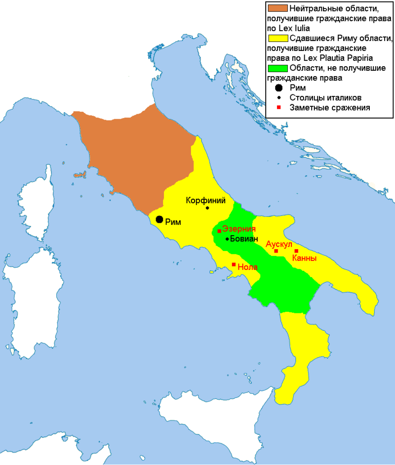 Італія під час союзницкої війни